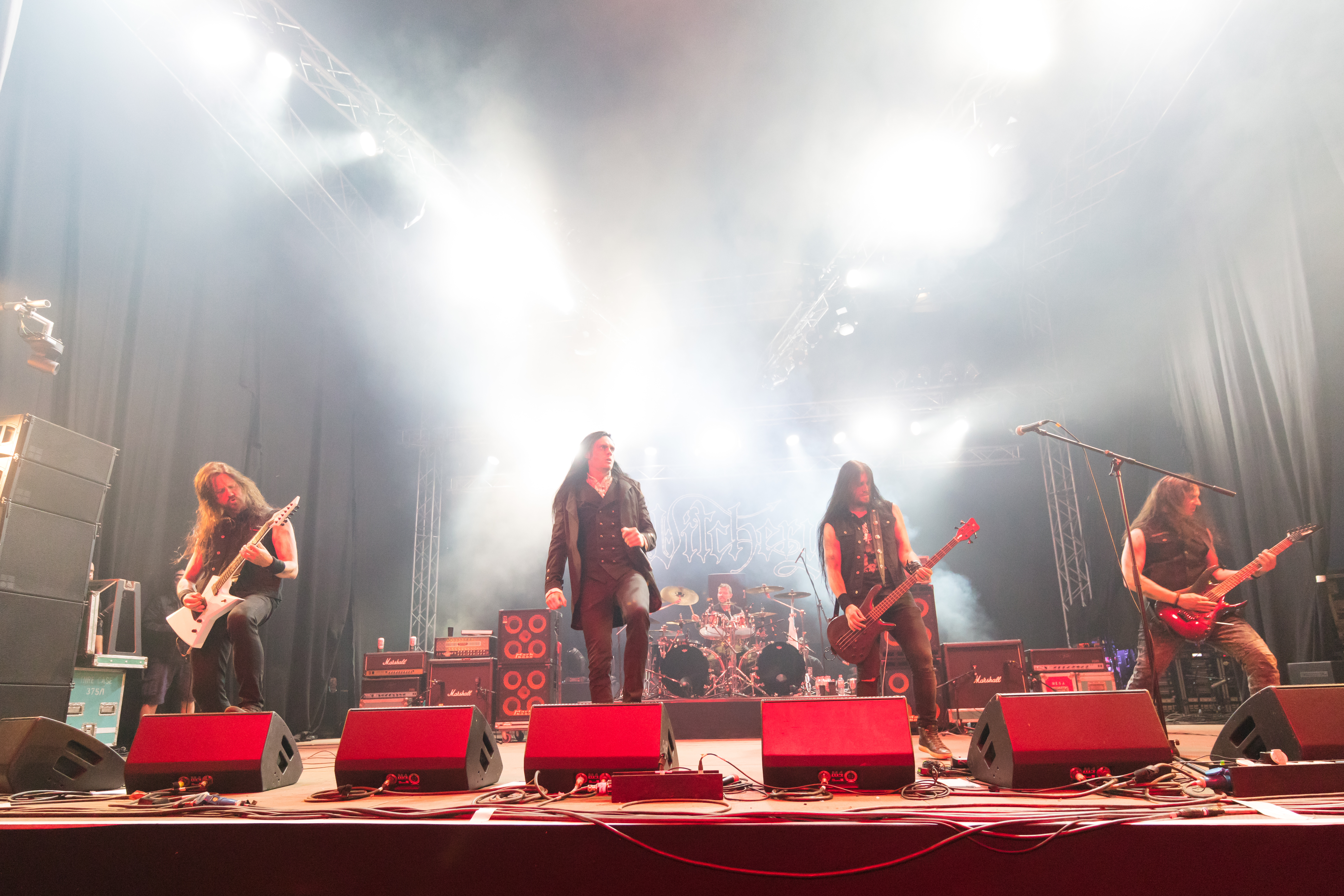 Witchery during Wacken Open Air at Schleswig-Holstein, Wacken, , Germany on 2017-08-03, Photo: Sven Mandel